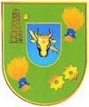 Герб Прилуцького району